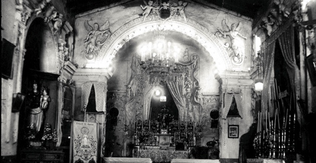 Interni della vecchia chiesetta